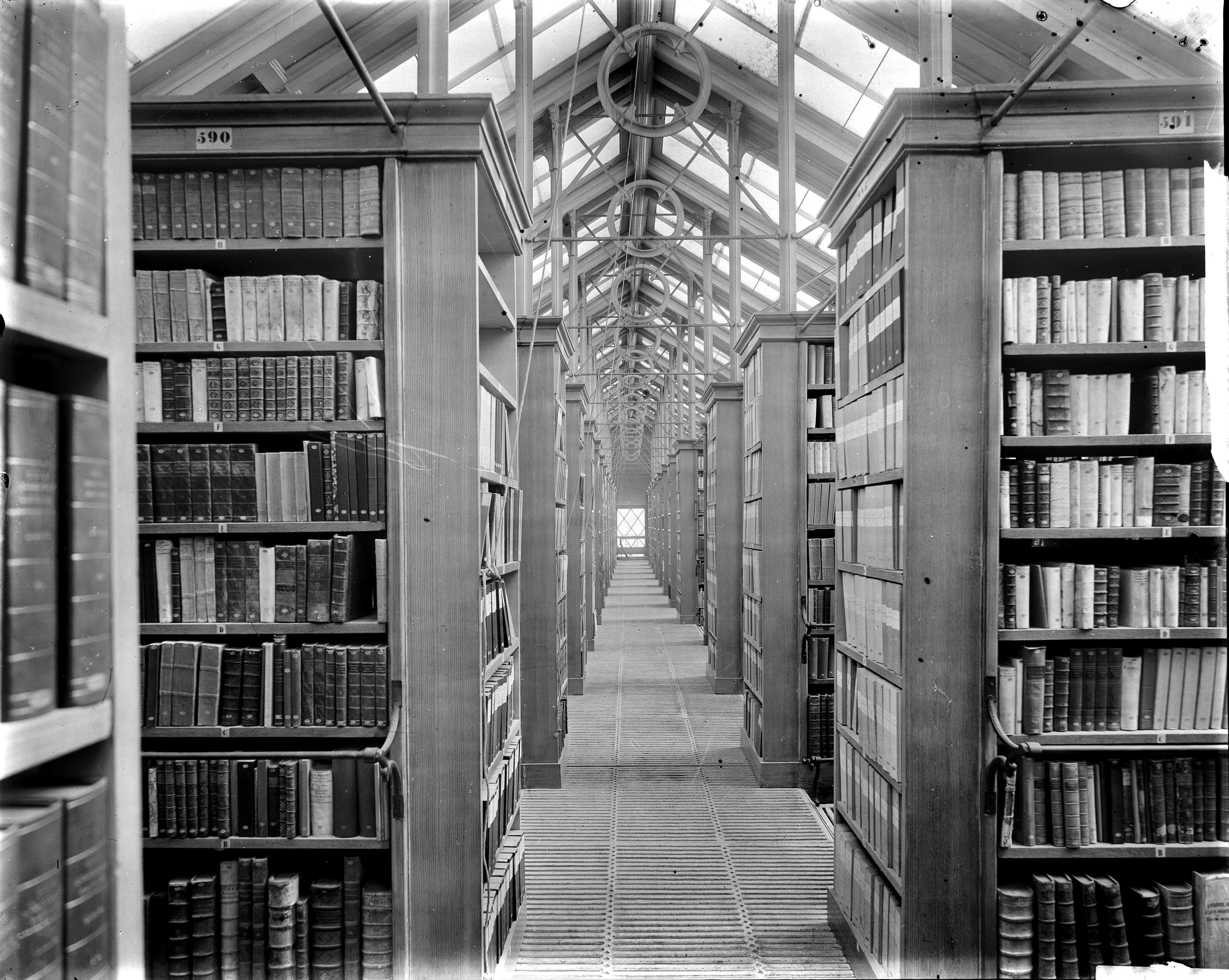 Gezicht op het depot van de universiteitsbibliotheek aan het Rapenburg in Leiden. Boekenkasten onder een schuin glazen dak.